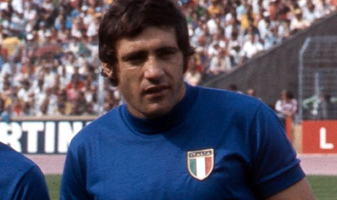 Giorgio Chinaglia con la maglia della Nazionale negli anni '70. Licensing Categoria:Immagini di Giorgio Chinaglia